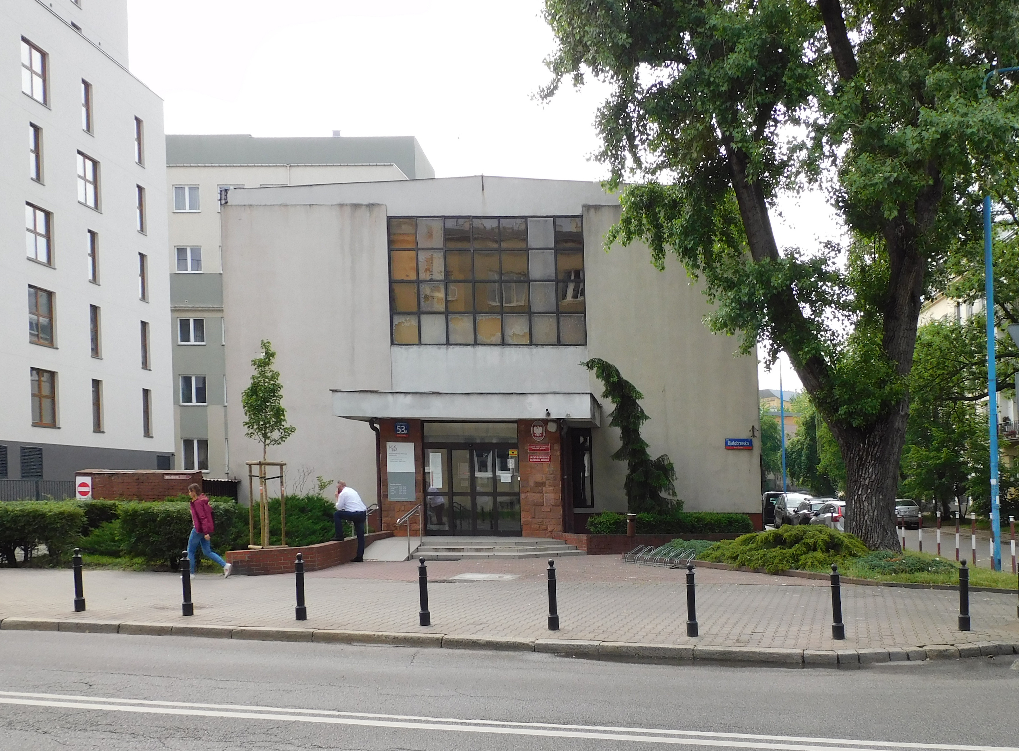 Ulica Białobrzeska 53a w Warszawie, Urząd Skarbowy Warszawa-Bemowo